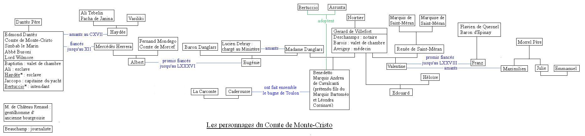 Les personnages du comte de Monte-Cristo